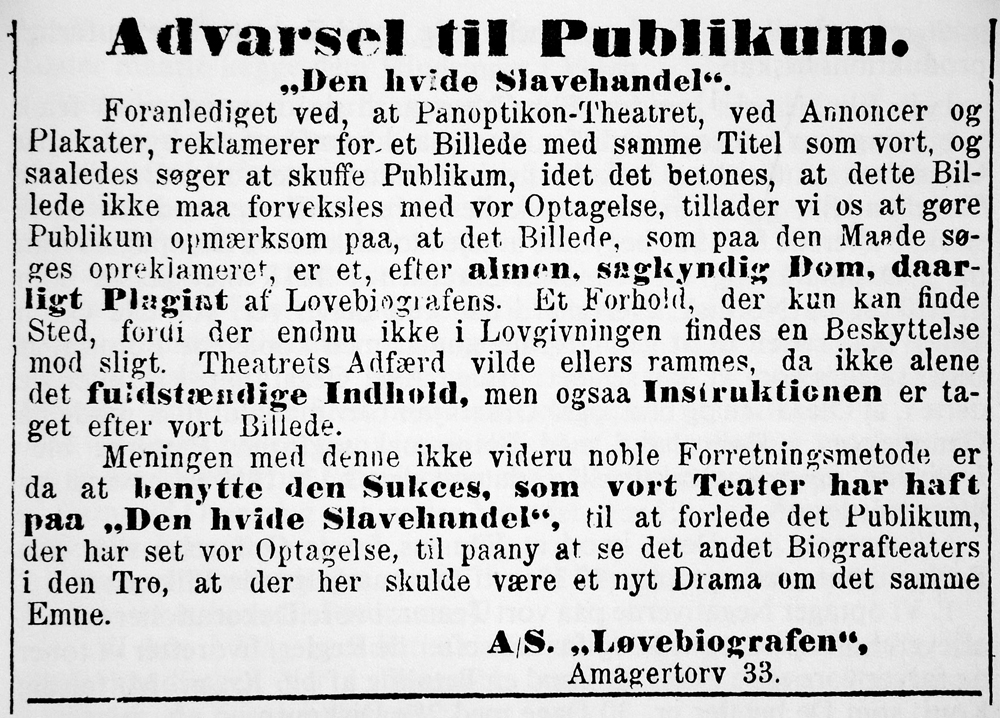 Annonce indrykket af Fotorama, da Nordisk Film i 1910 efter deres mening havde plagieret filmen Den hvide slavehandel